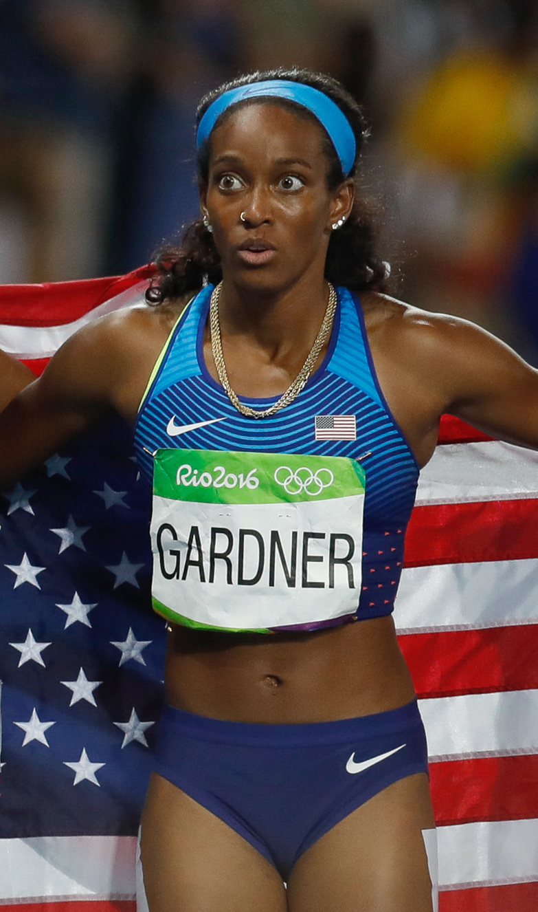 Rio de Janeiro - Corredoras dos Estados Unidos Tianna Bartoletta, Allyson Felix, English Gardner e Tori Bowie vencem final do revezamento 4 x 100m nos Jogos Rio 2016, no Estádio Olímpico (Fernando Frazão/Agência Brasil)